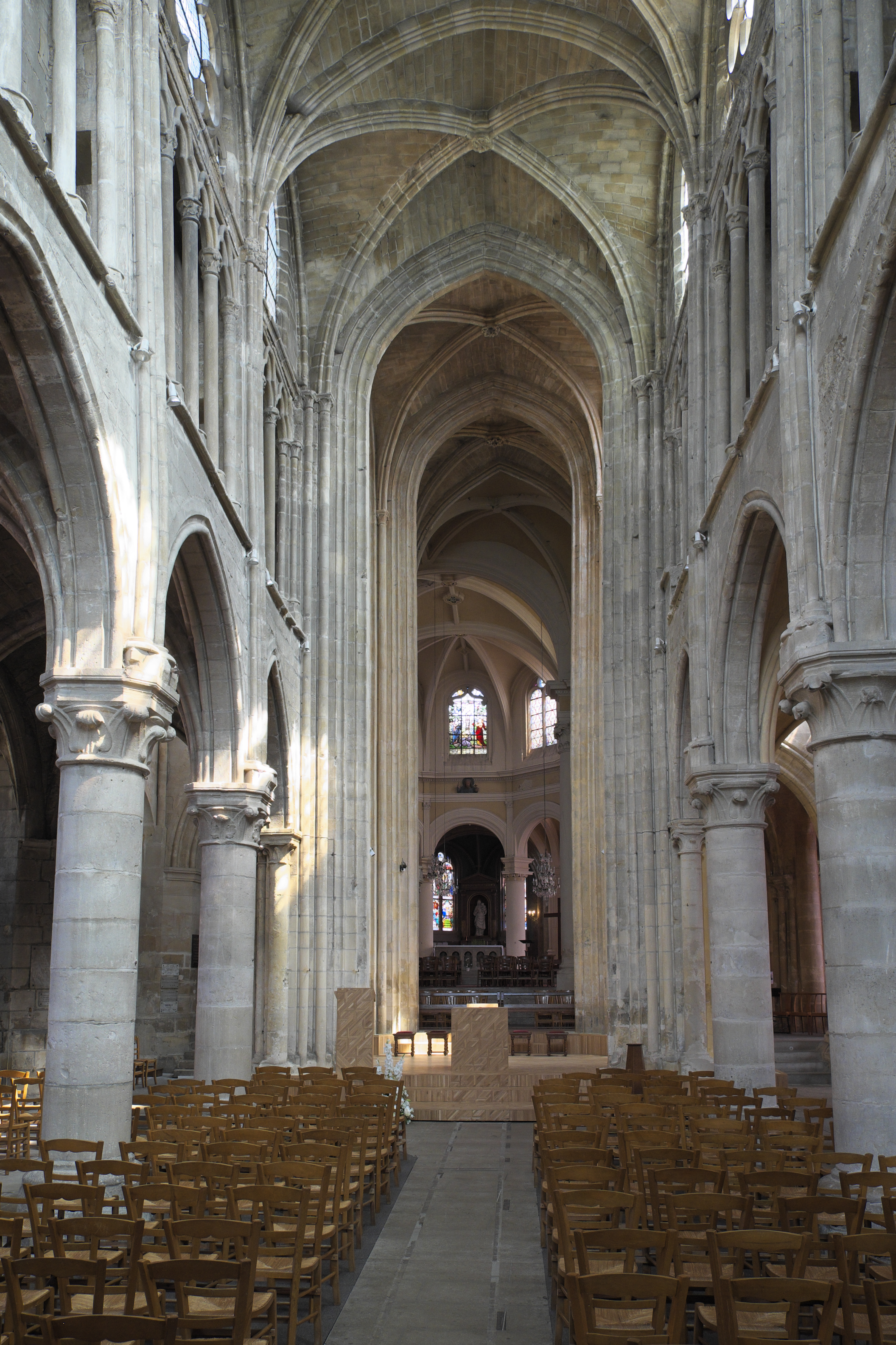 Katholische Pfarrkirche Saint-Martin in Triel-sur-Seine im Département Yvelines (Île-de-France/Frankreich), Langhaus